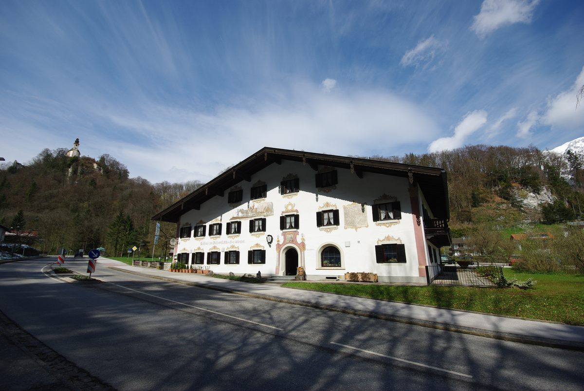 Gasthof Moserwirt, Bad Reichenhall